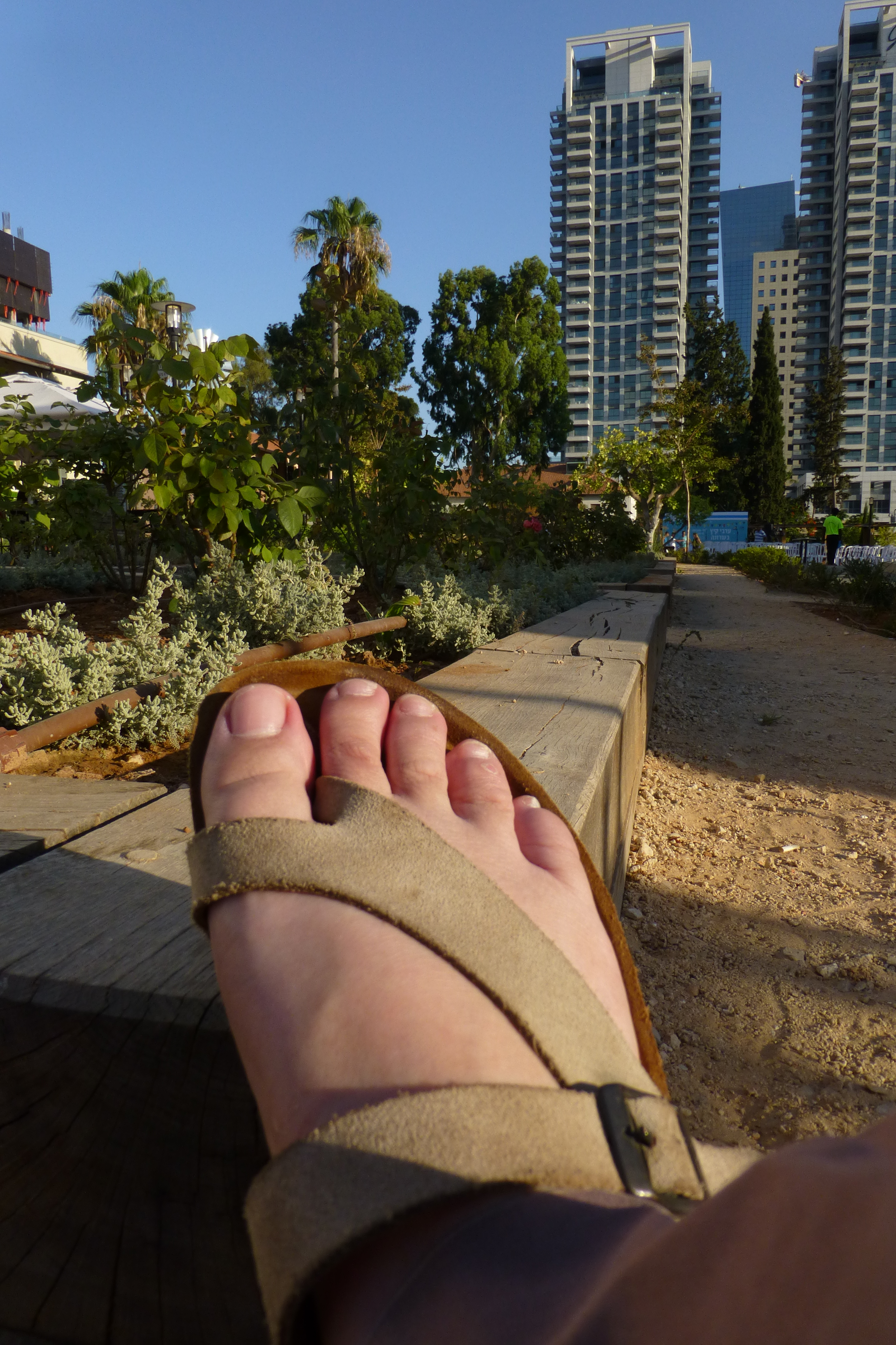 שׂרונה היא המושבה הרביעית שהקימו הגרמנים הטמפלרים בארץ ישראל במחצית השנייה של המאה ה-19. המושבה הוקמה ארבעה קילומטרים צפונית ליפו, ואחרוני בתיה שוכנים כיום בתל אביב בין שדרות שאול המלך מצפון, דרך בגין במזרח, רחוב הארבעה מדרום, ומגרשי החנייה של אחוזות החוף ממערב. מקצתם נמצאים היום בתוך בסיס הקריה.